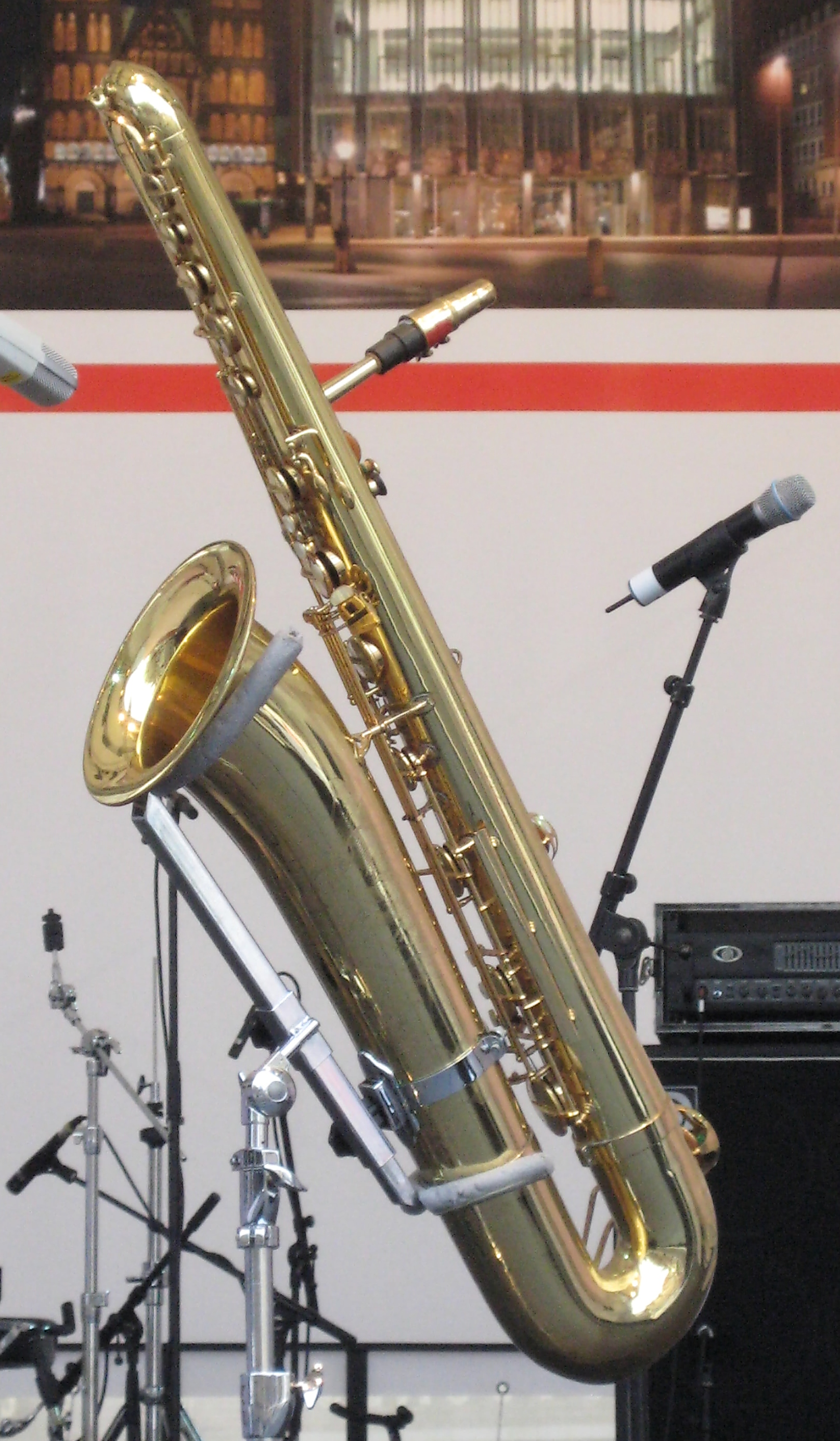 Basssaxophon, Hersteller: Keilwerth. Die Fotoaufnahme erfolgte beim bzw. vorm Auftritt einer Band auf dem Bremer Marktplatz am 3. Oktober 2010 bei einem der Open-Air-Konzerte, die im Rahmen des begleitenden Bürgerfestes zur im Jahr 2010 in Bremen stattfindenden, offiziellen Feier des 20. Tags der Deutschen Einheit veranstaltet wurden.